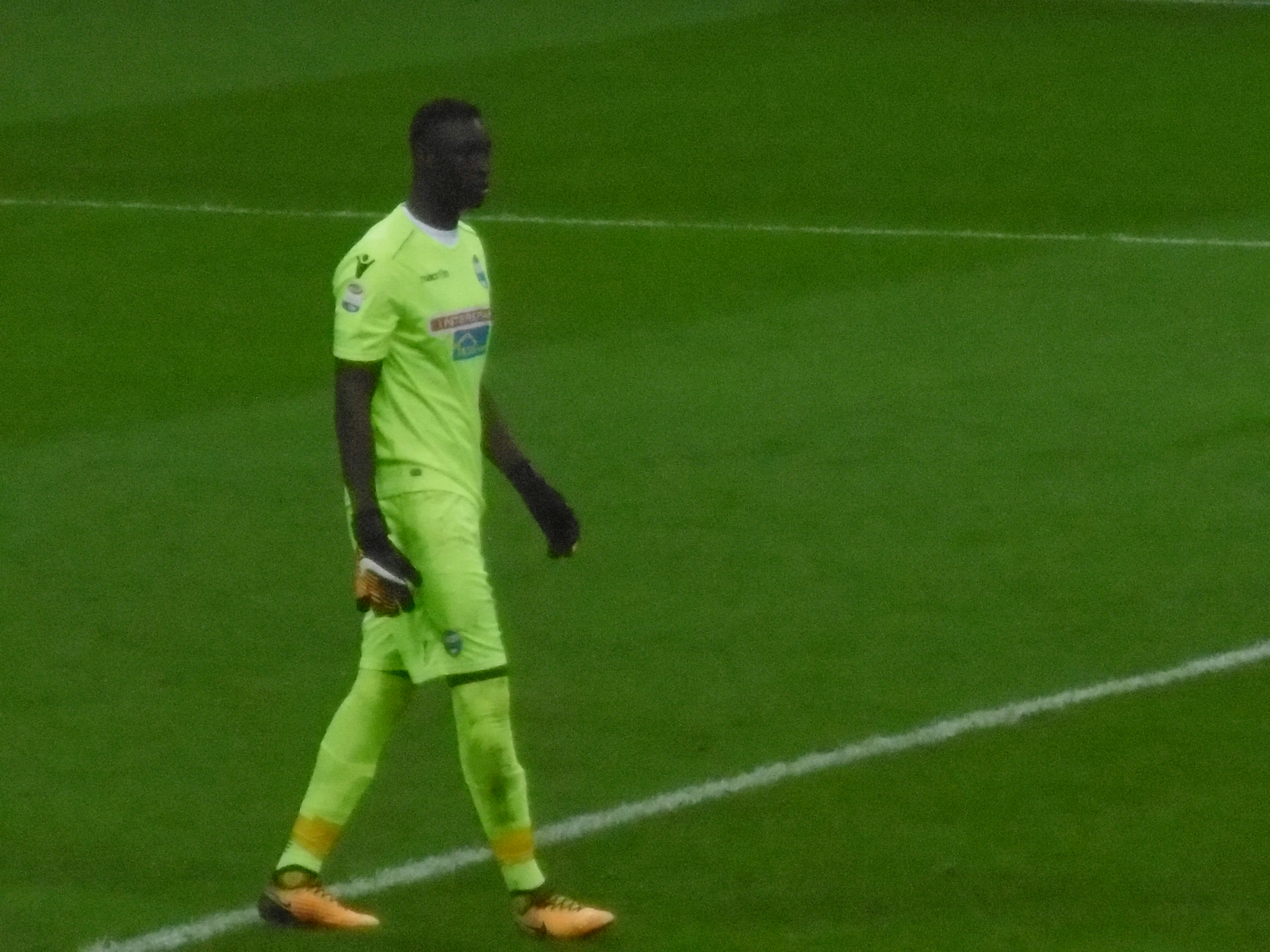 Alfred Gomis nella partita Milan - Spal del 20 settembre 2017, Stadio Meazza (Milano)